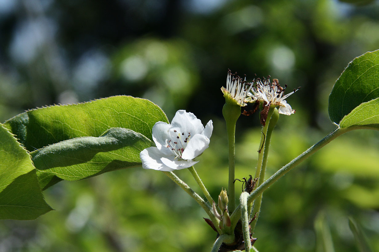 la fécondation des fleurs de nashi est hétérogène